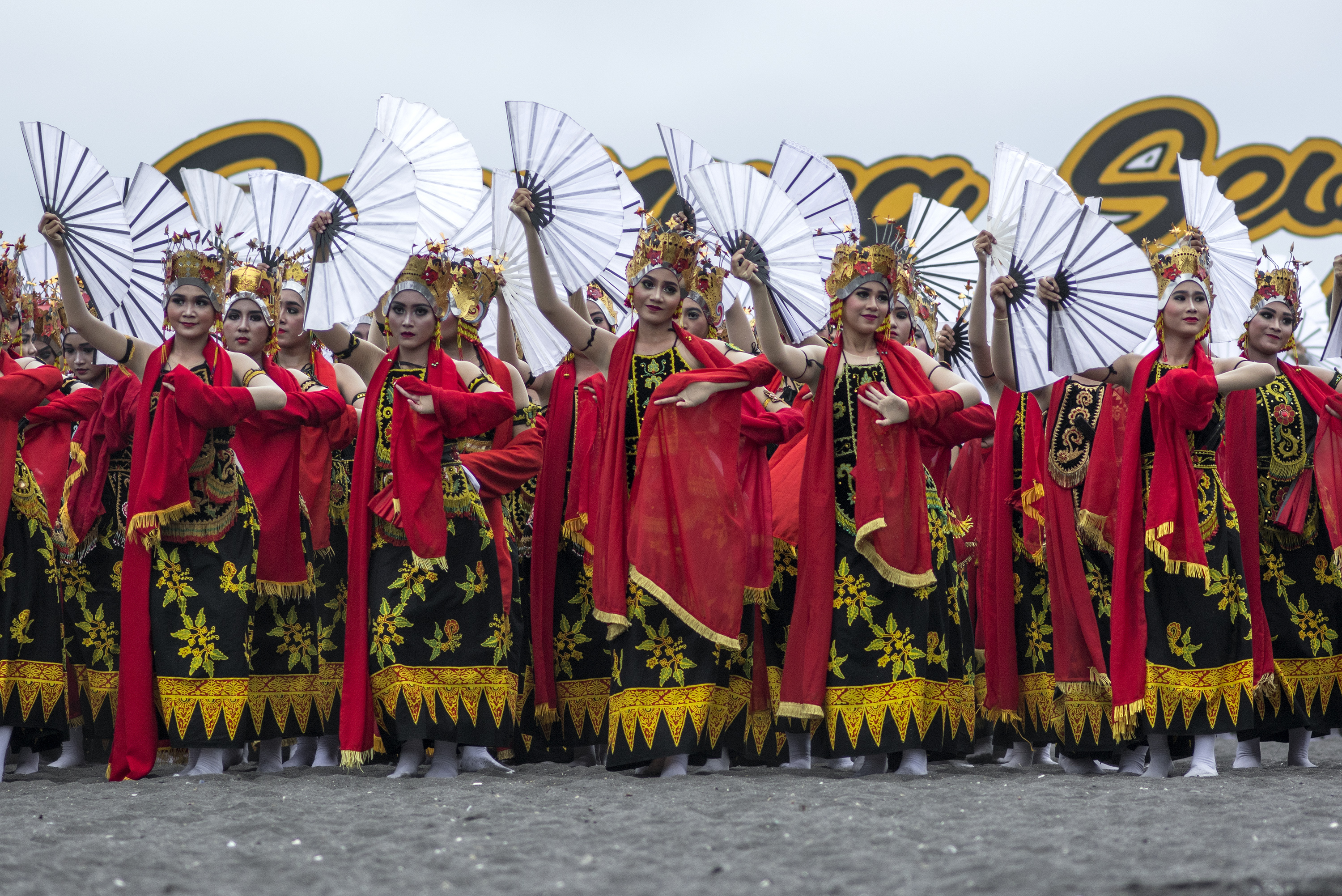 tarian gandrung yang dipentaskan secara kolosal